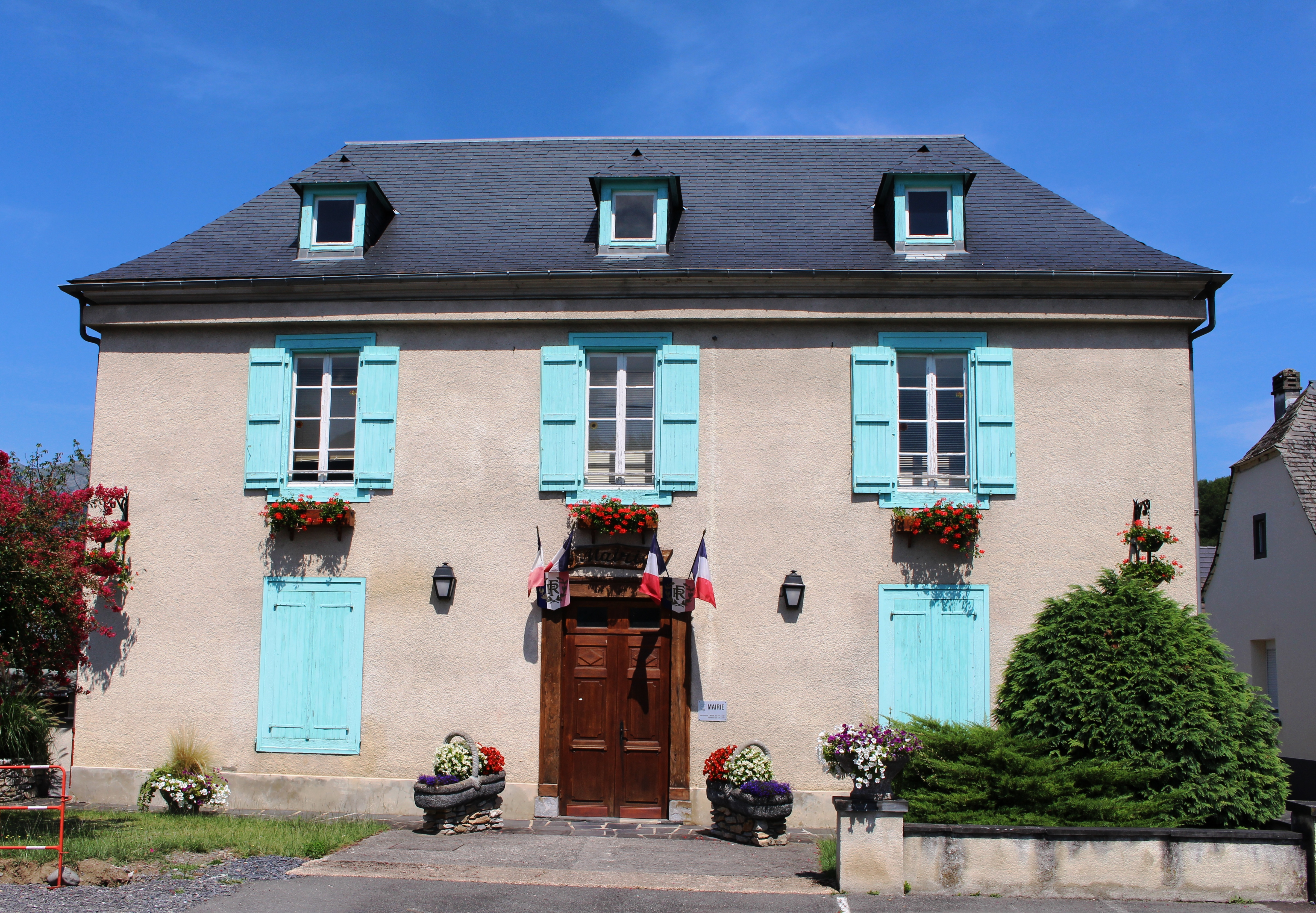 Mairie de Préchac (Hautes-Pyrénées)